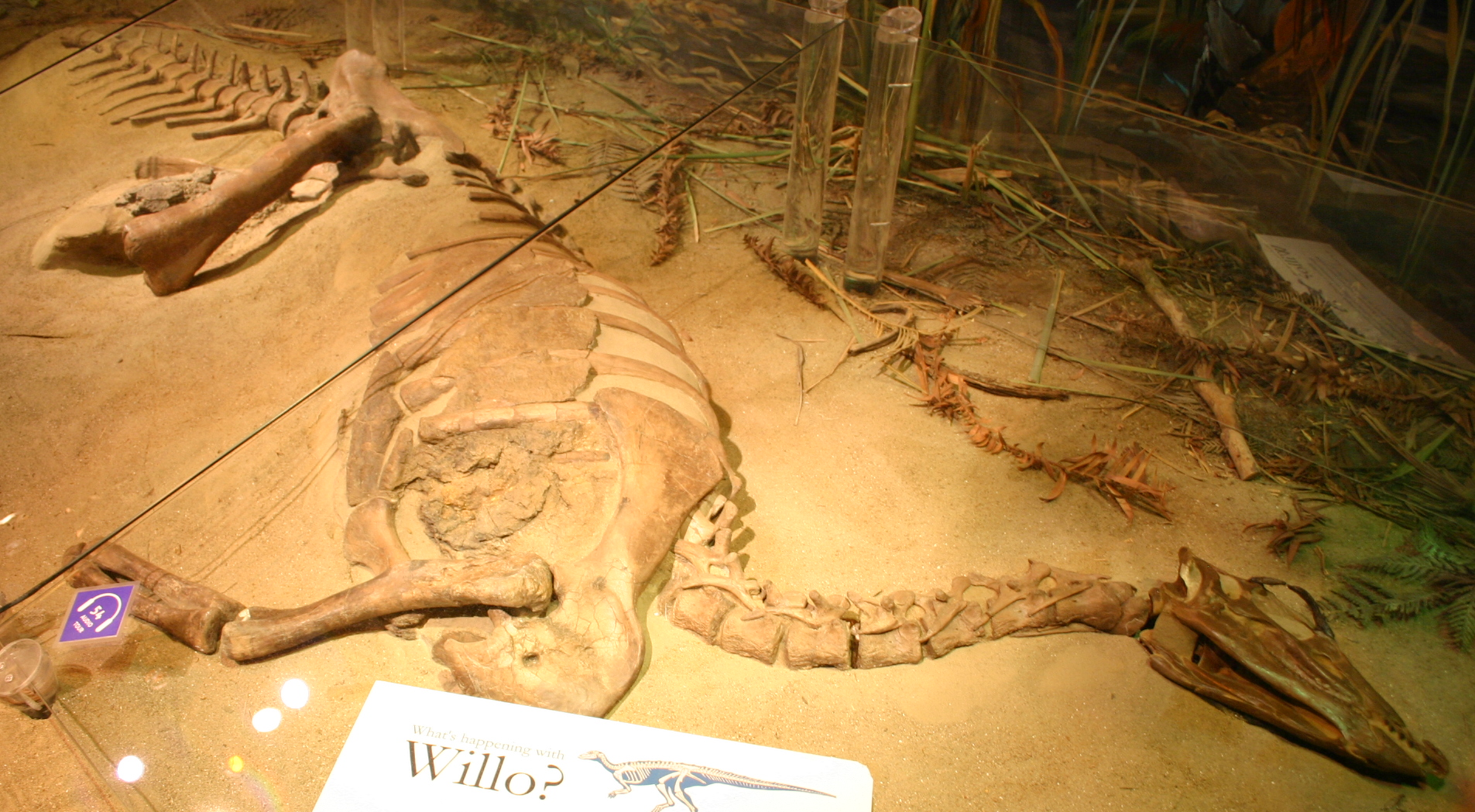 Visit my blog at